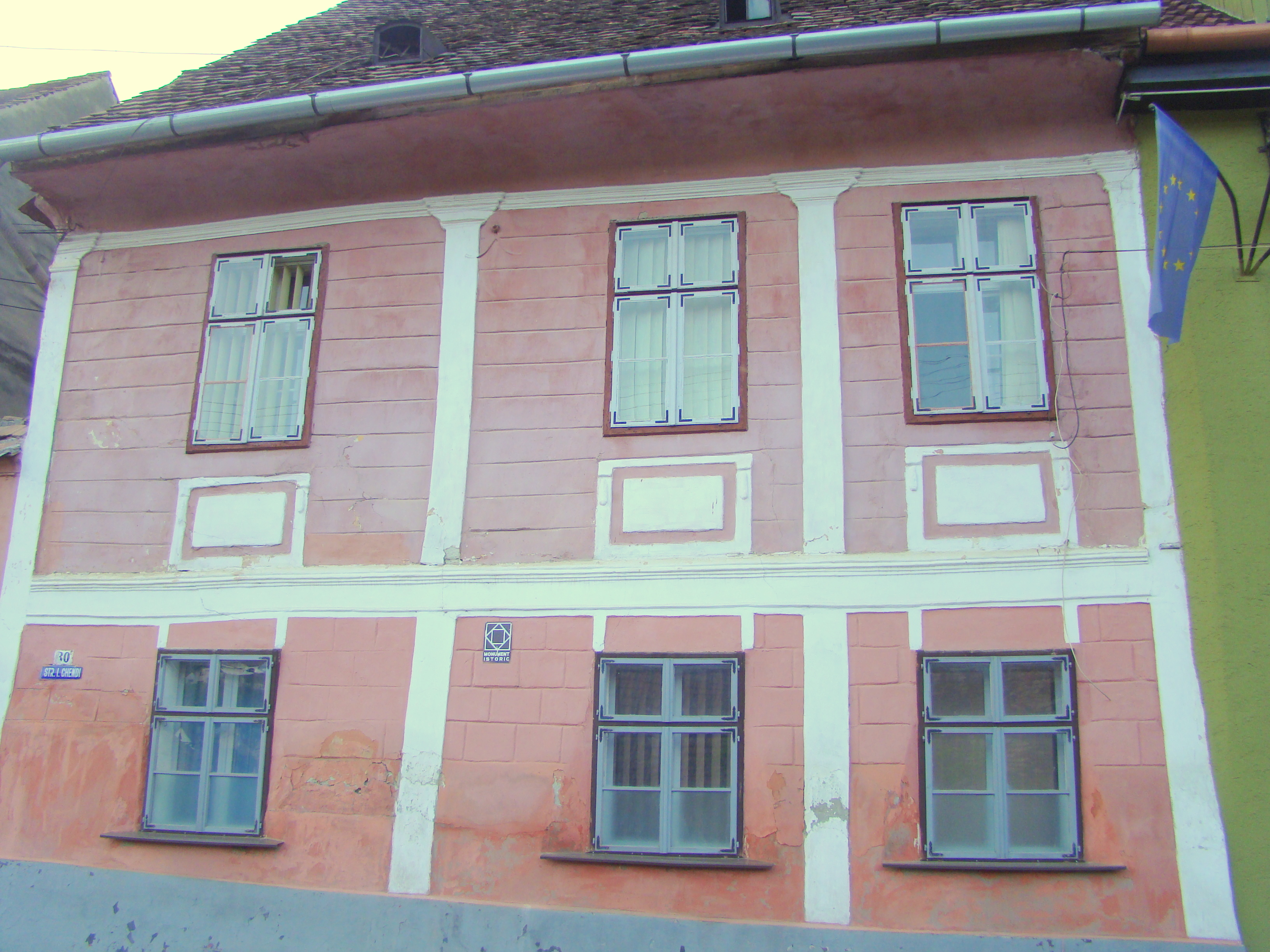 Casă, municipiul Sighișoara, str. Chendi Ilarie 30 1780 - 1820, cca. 1900